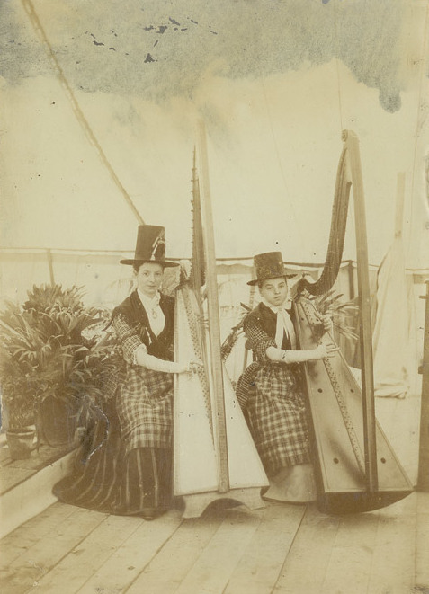 Teitl Cymraeg/Welsh title: Eisteddfod Caerwys - telynoresau Dyddiad/Date: [ca. 1892] Cyfrwng/Medium: Albumen print on glass Maint/Dimensions: 160 x 109 mm Cyfeiriad/Reference: fmc00054 (PB3795) Rhif cofnod / Record no.: 4444419 Rhagor o wybodaeth am Ffotograffau Mewn Casys yn Llyfrgell Genedlaethol Cymru Find out more about Cased Photographs at the National Library of Wales